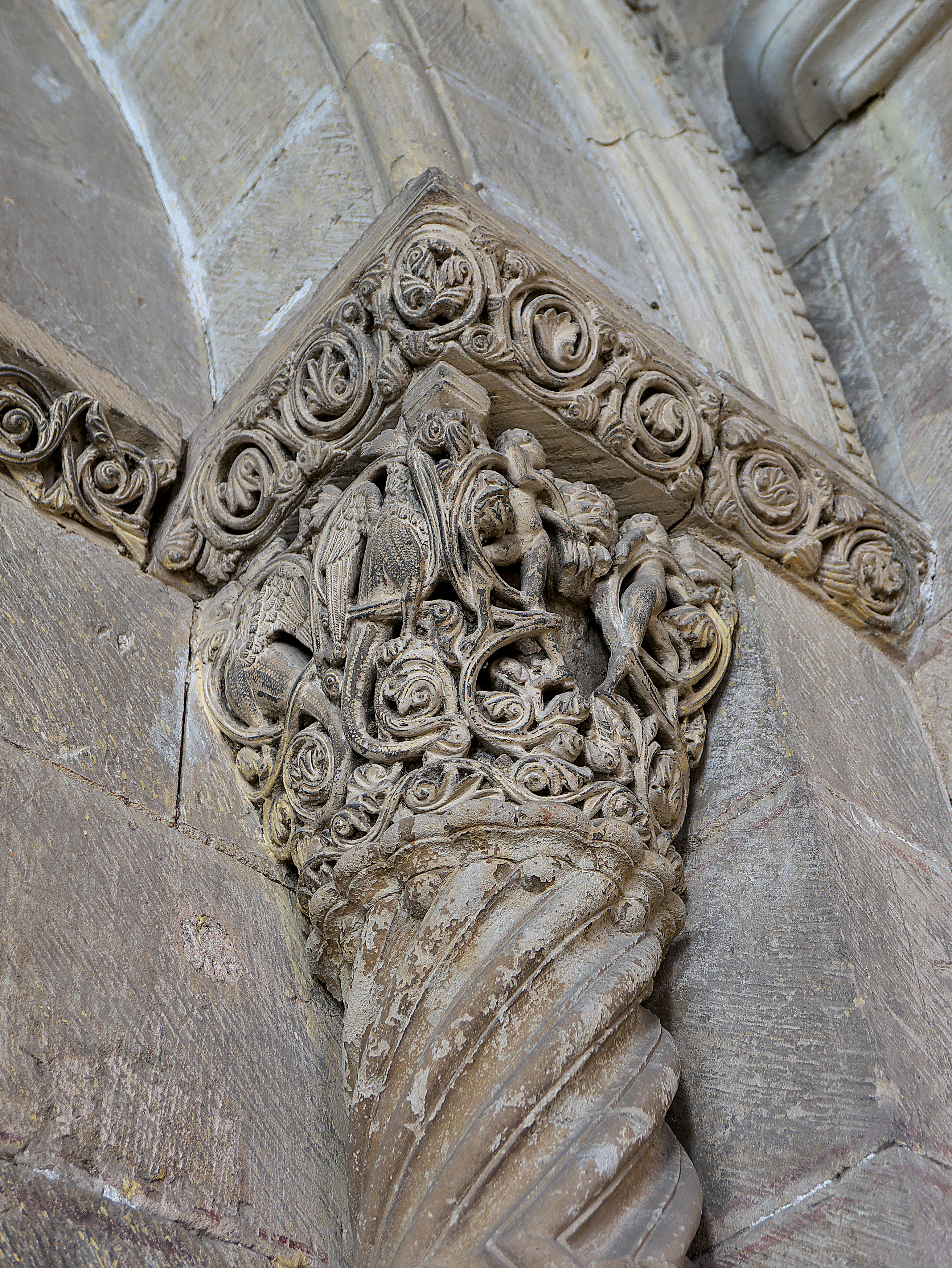 Portada de acceso al claustro (1164-1185). Trabajados minuciosamente, tanto los roelos del cimacio como la cesta.